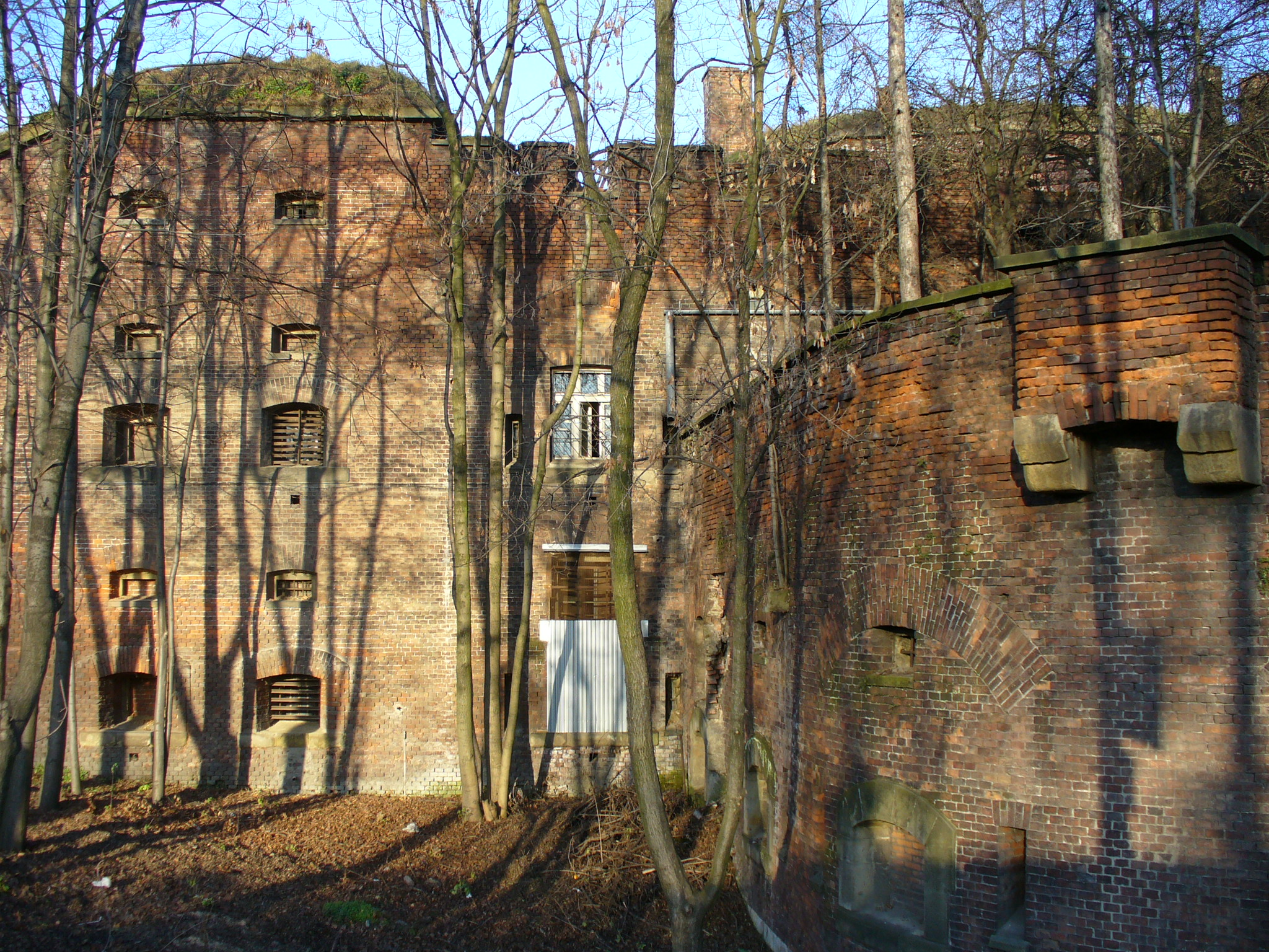 Festung Krakau - Twierdza Kraków - fort Luneta Warszawska